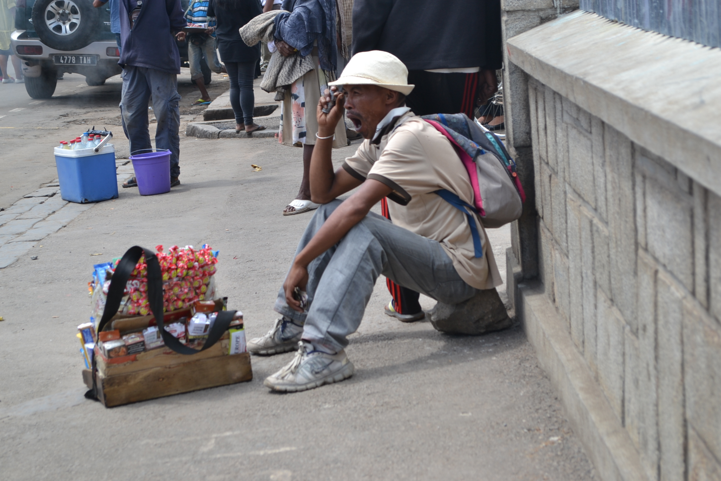 Un marchand de bonbon, cigarette dans les rue d'antananarivo MAdagascar This is an image of "African people at work" from Madagascar